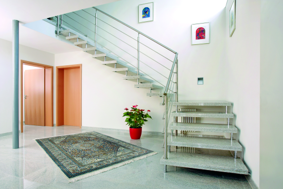 Freitragende Tragbolzentreppe